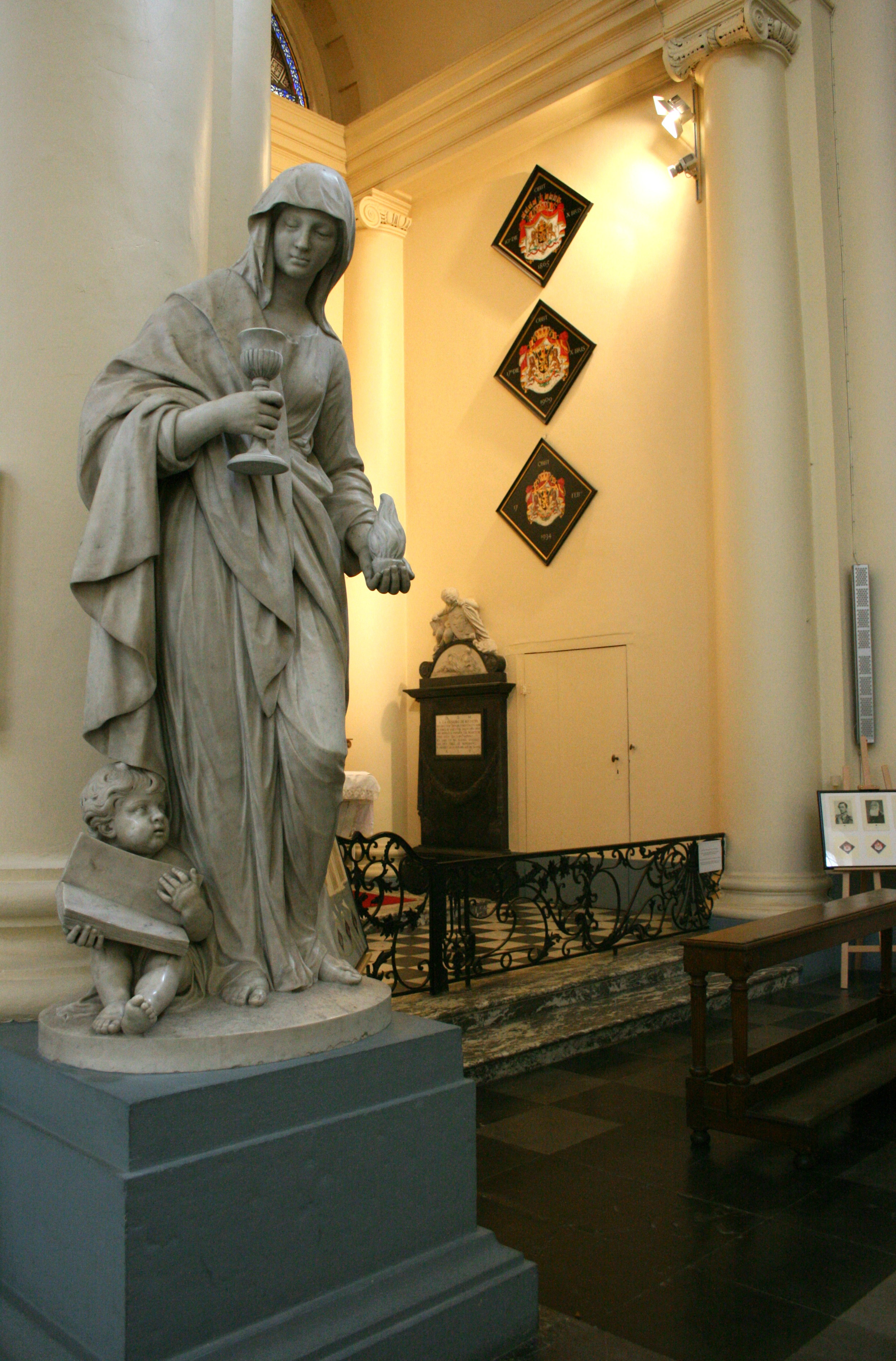 Église Saint Jacques sur-Coudenberg, place Royale, Bruxelles, Belgique. A droite du choeur, chapelle de Saint Jean Népomucène